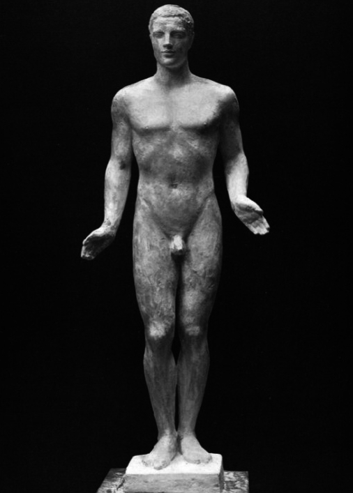 Gipsmodell 1942, Apollon. Von Charles Despiau (1874–1946)